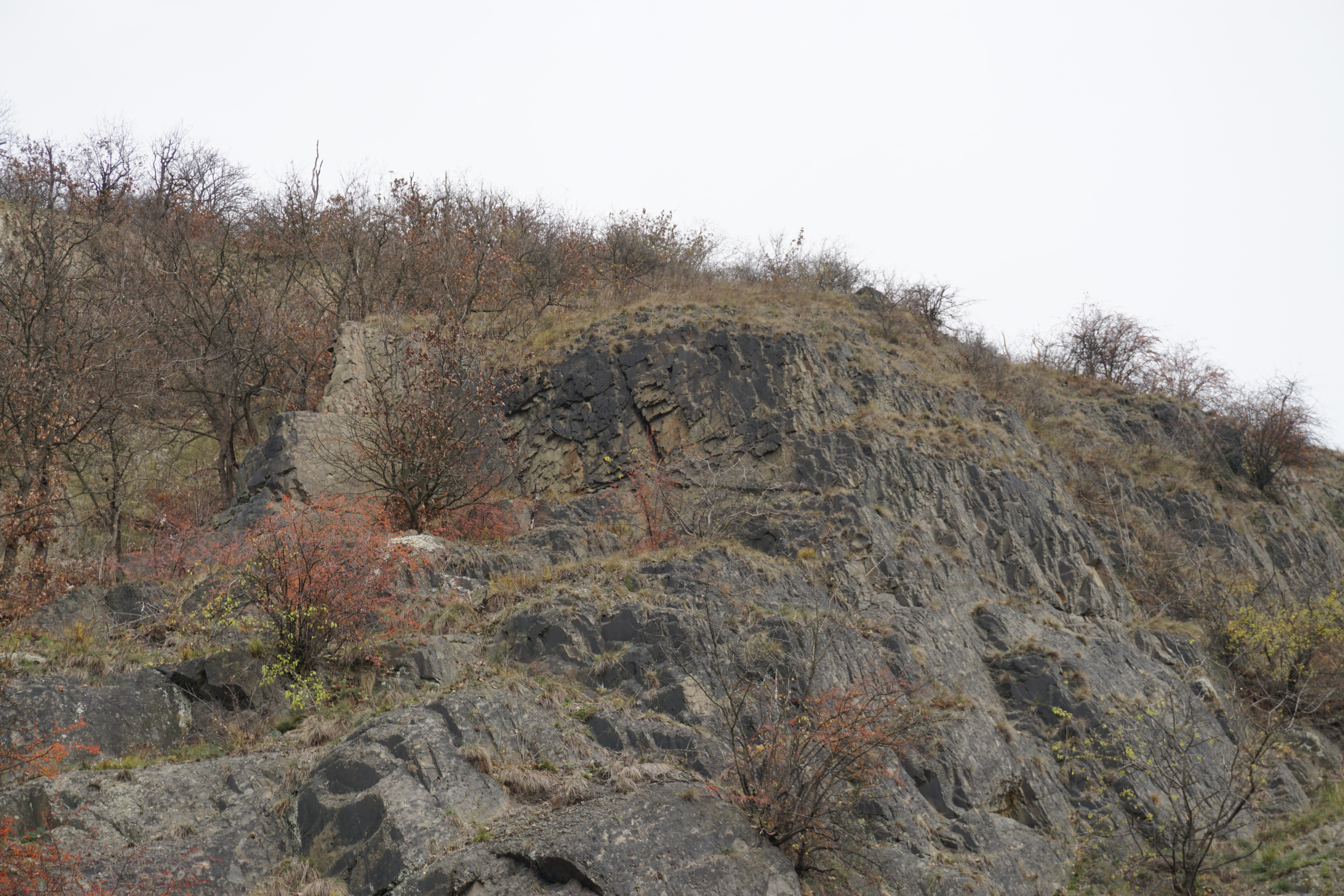 Výhled z Povltavské ulice